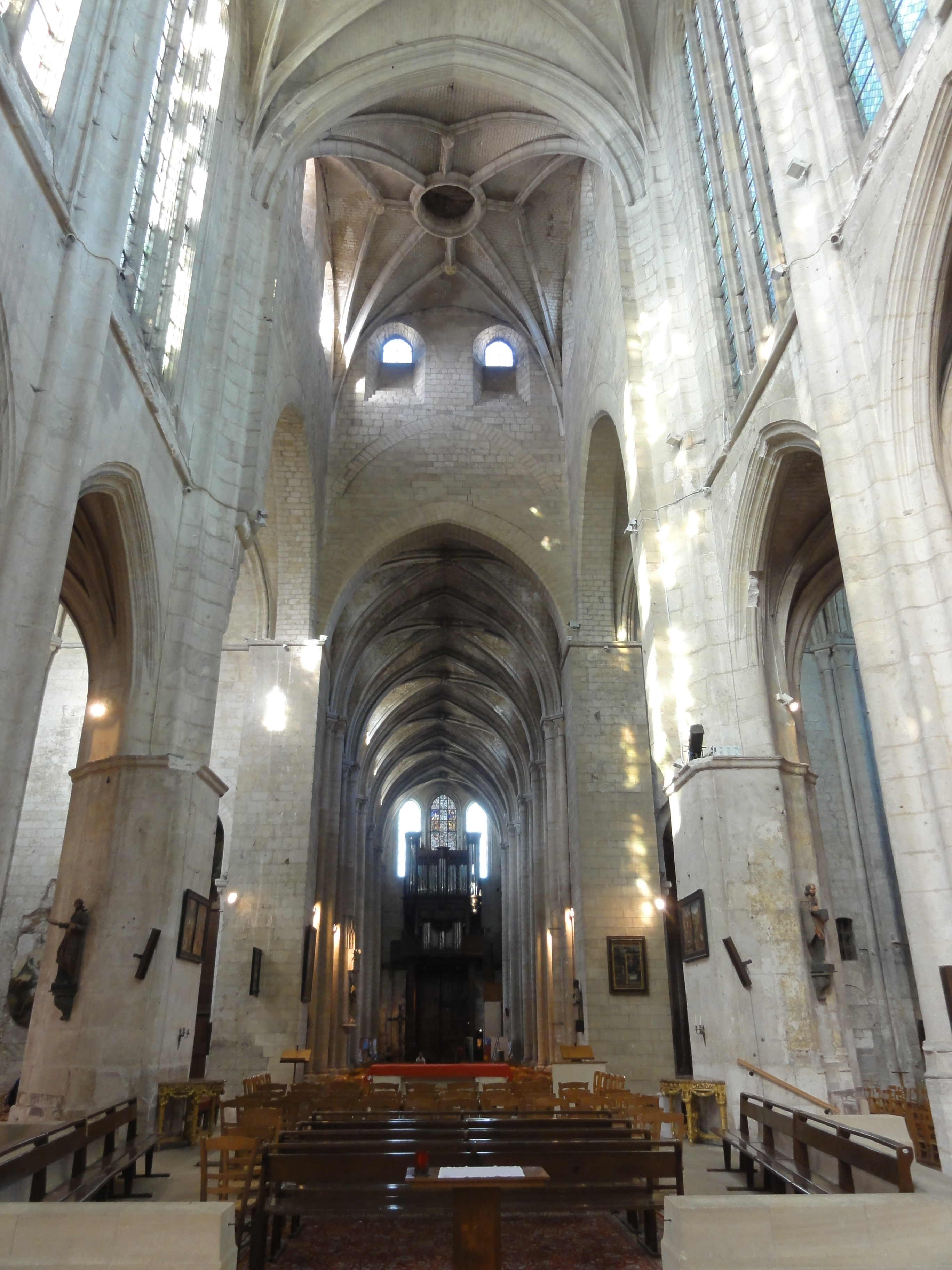 Chœur, vue vers l'ouest.